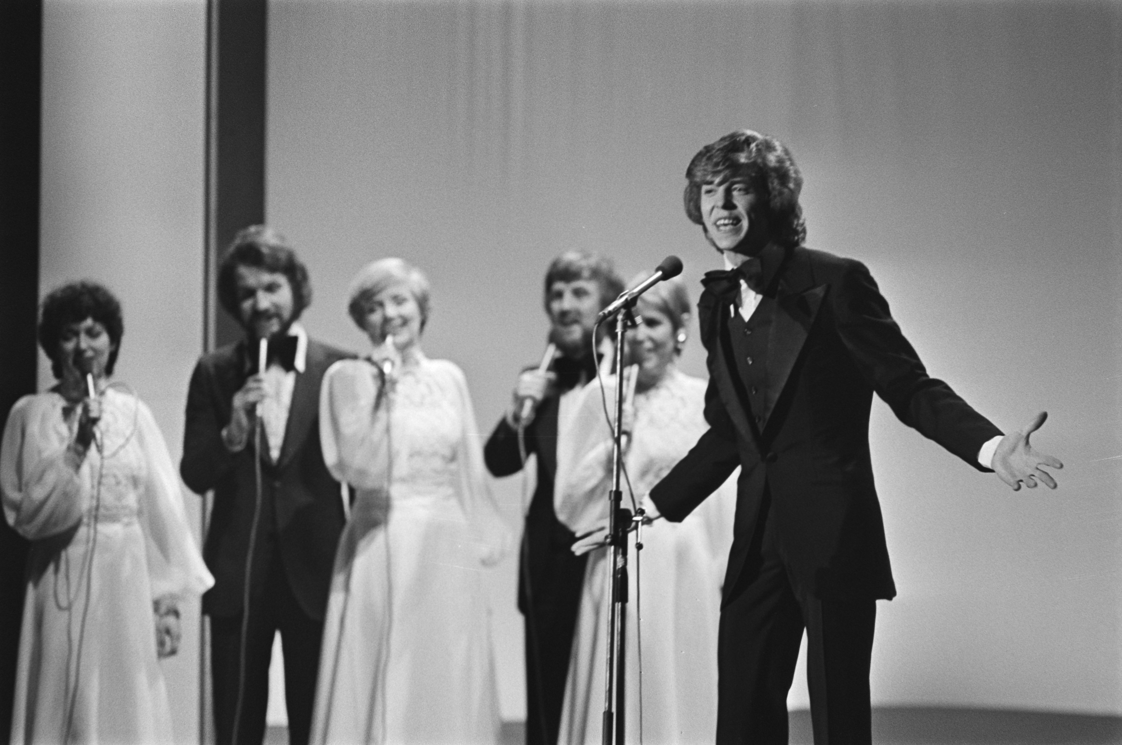 Collectie / Archief : Fotocollectie Anefo Reportage / Serie : [ onbekend ] Beschrijving : Eurovisie Songfestival 76 Den Haag ; Jurgen Marcus (Luxemburg) Datum : 3 april 1976 Locatie : Den Haag, Luxemburg Trefwoorden : songfestivals Persoonsnaam : Eurovisie Songfestival Fotograaf : Mieremet, Rob / Anefo Auteursrechthebbende : Nationaal Archief Materiaalsoort : Negatief (zwart/wit) Nummer archiefinventaris : bekijk toegang 2.24.01.05 Bestanddeelnummer : 928-5031